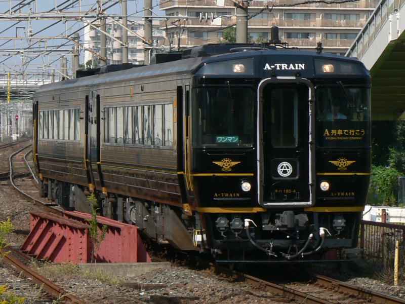 特急「A列車で行こう」用キハ185系 (キハ185-4 + キハ185-1012)